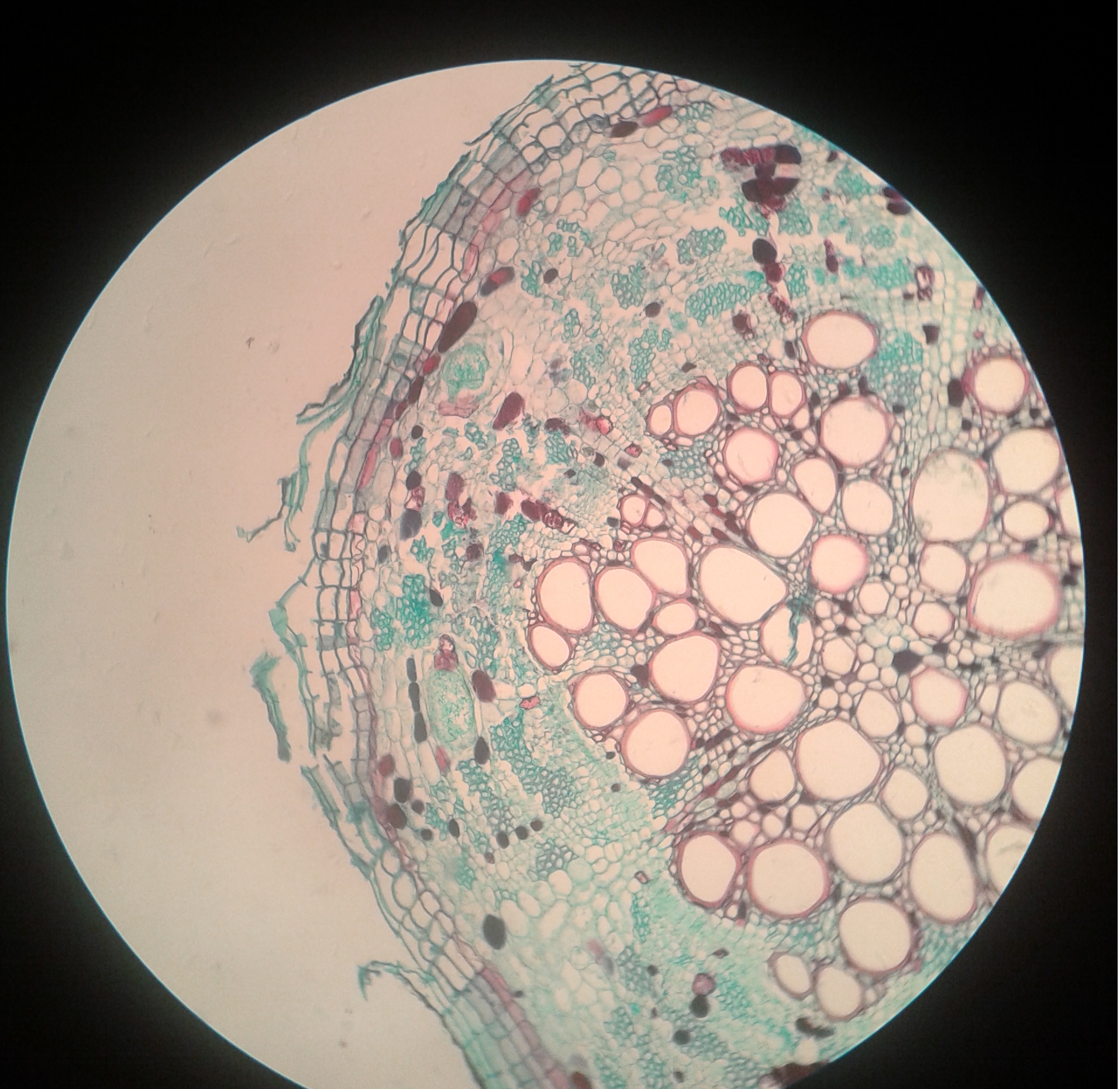 Fotografia de microscópio ótico, aumento de 100 vezes.